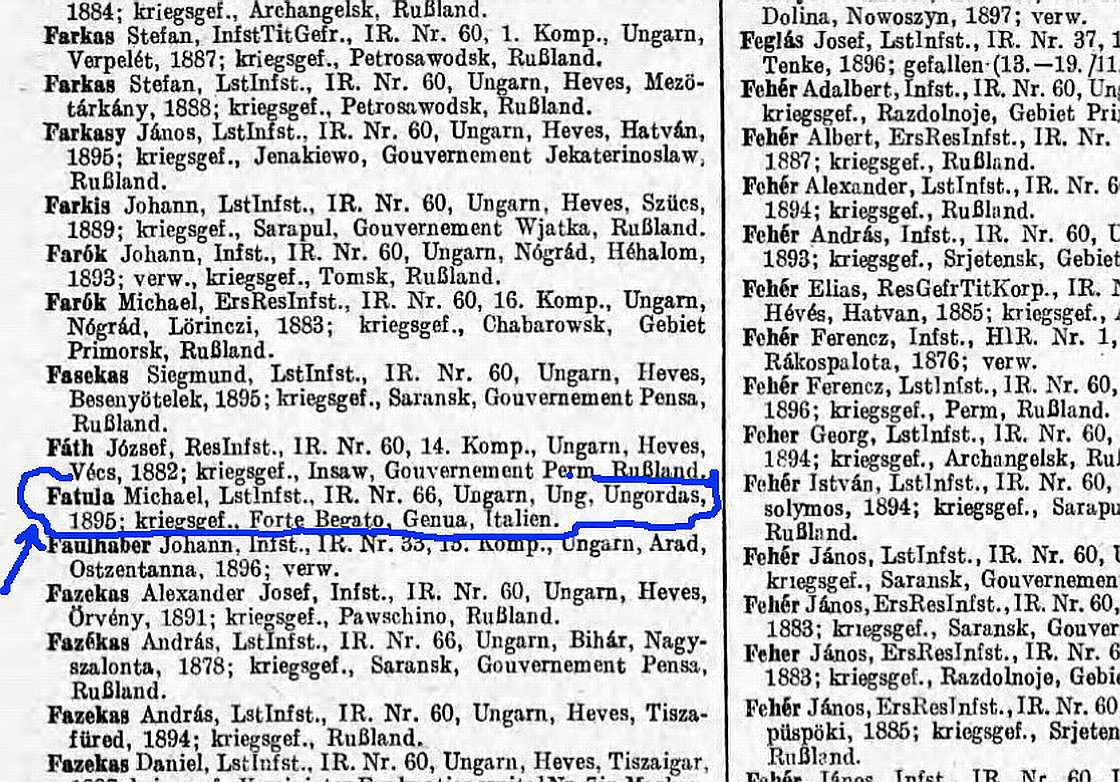 Фатула Михайло 1895 р.н. ,Унг, Унгордаш - перебував у італійському полоні у Форте Бегато, Генуя, Італія. Fatula Michael (1895) Ung, Ungordas. ( Forte Begato Genova, Italien)